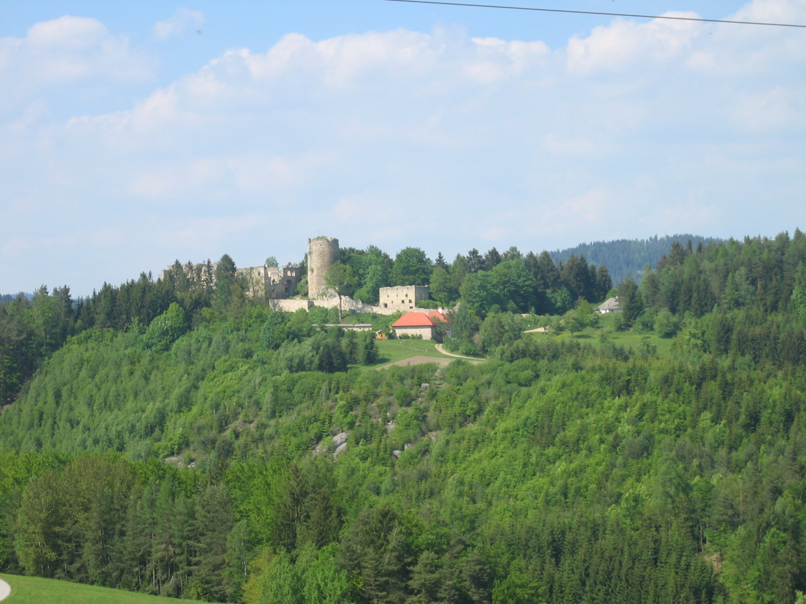 Blick auf die Burgruine Prandegg